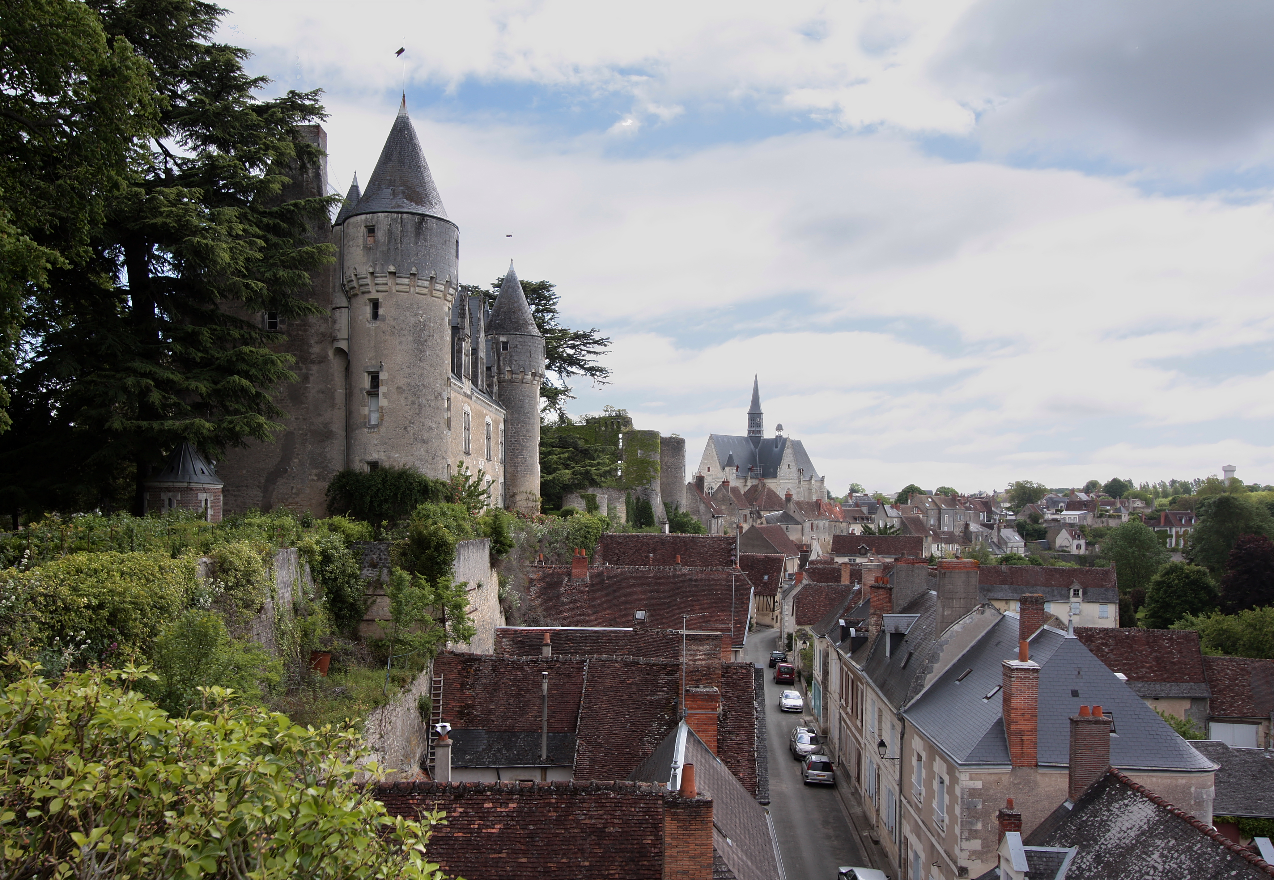 Ortschaft Montrésor im Département Indre-et-Loire/Frankreich - Blick von Schloss Montrésor über den Ort.